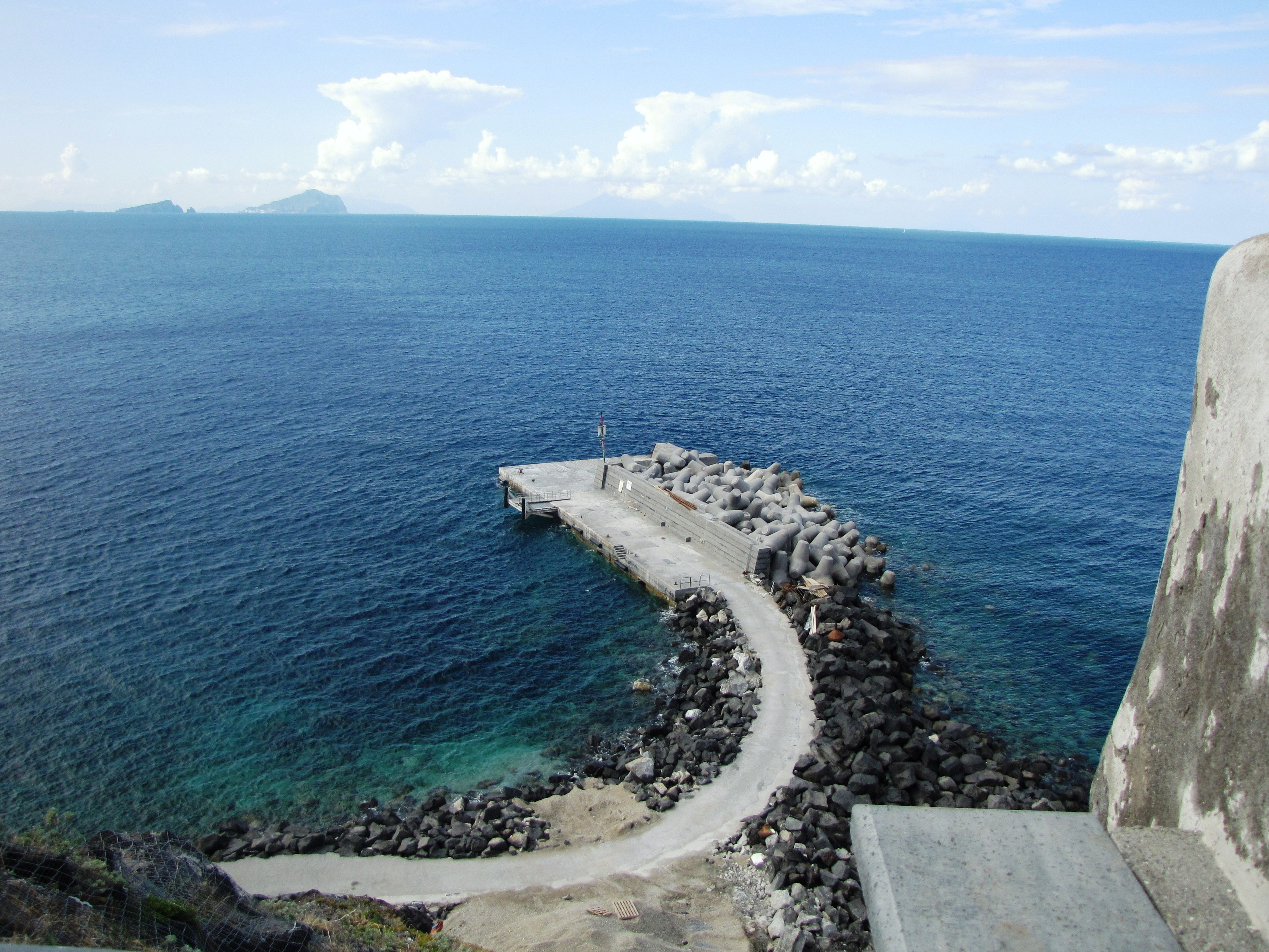 het haventje van Ginostra-eiland Stromboli